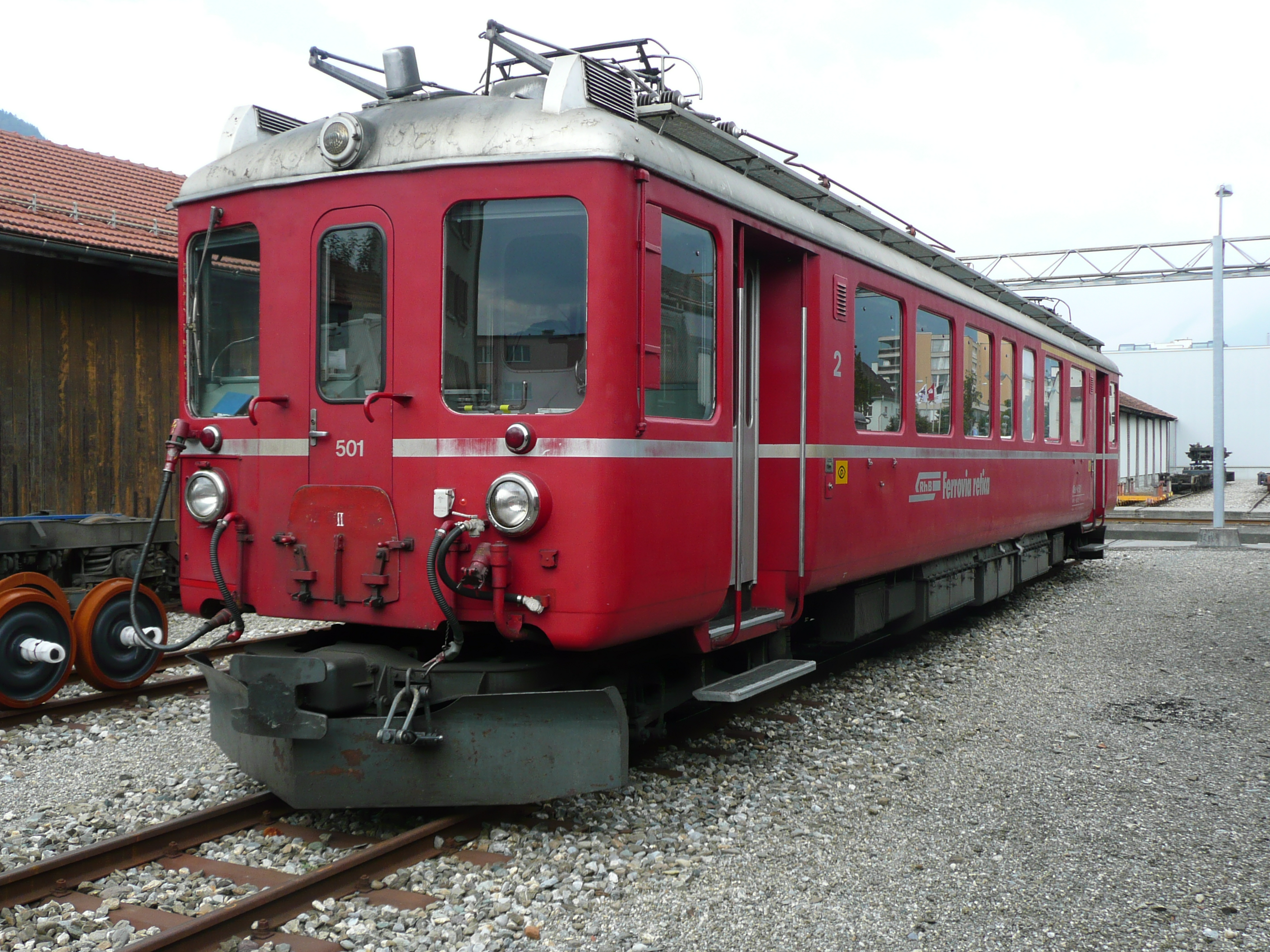 ABe 4/4 Nr. 501 im Lokomotivdepot Landquart